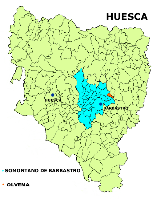 Mapa del municipio de Olvena Creado el 06.10.2006 por Dionisio en base a Image:Aragon municipalities.png